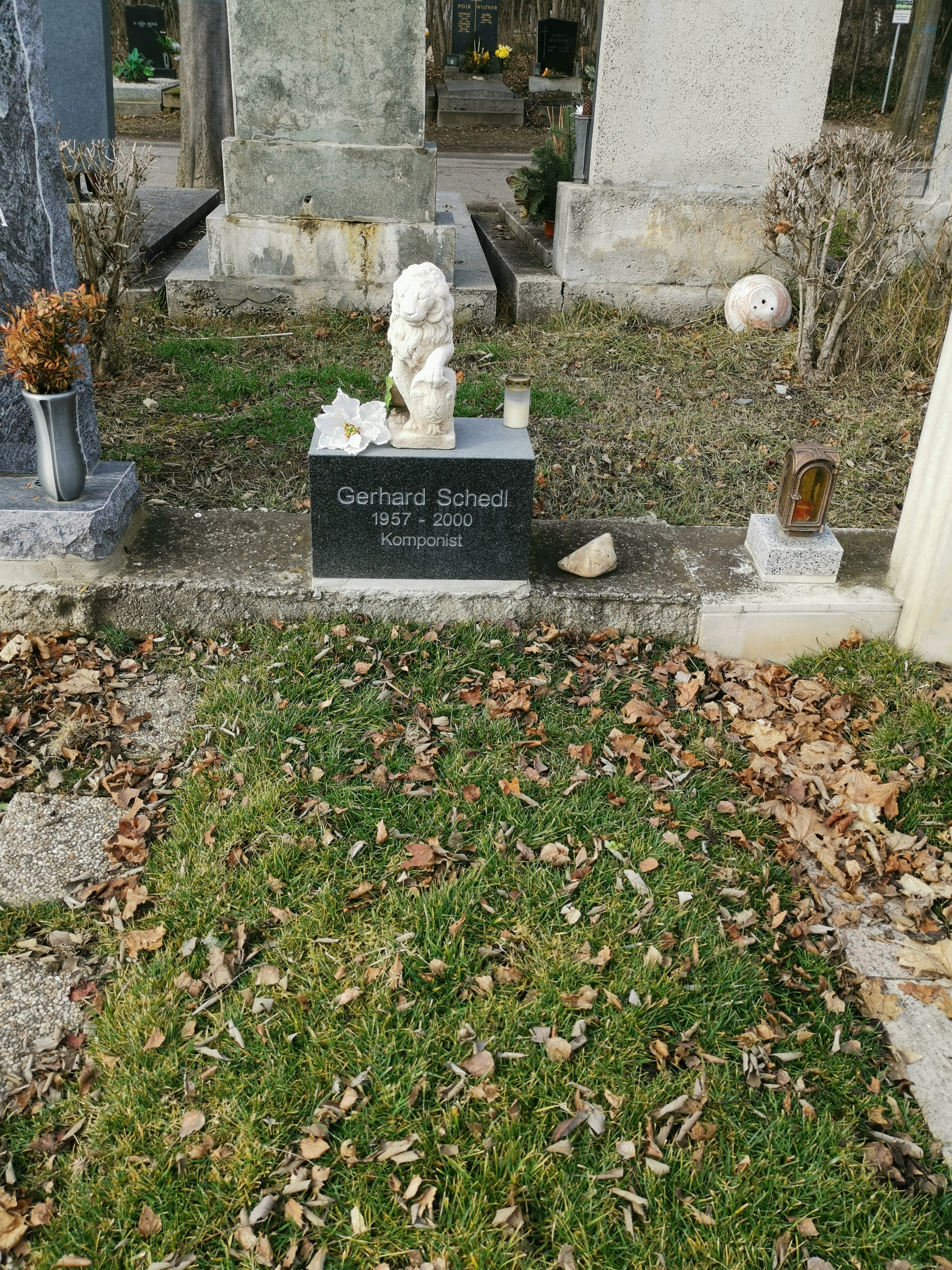 Grab Gerhard Schedl auf dem Wiener Zentralfriedhof